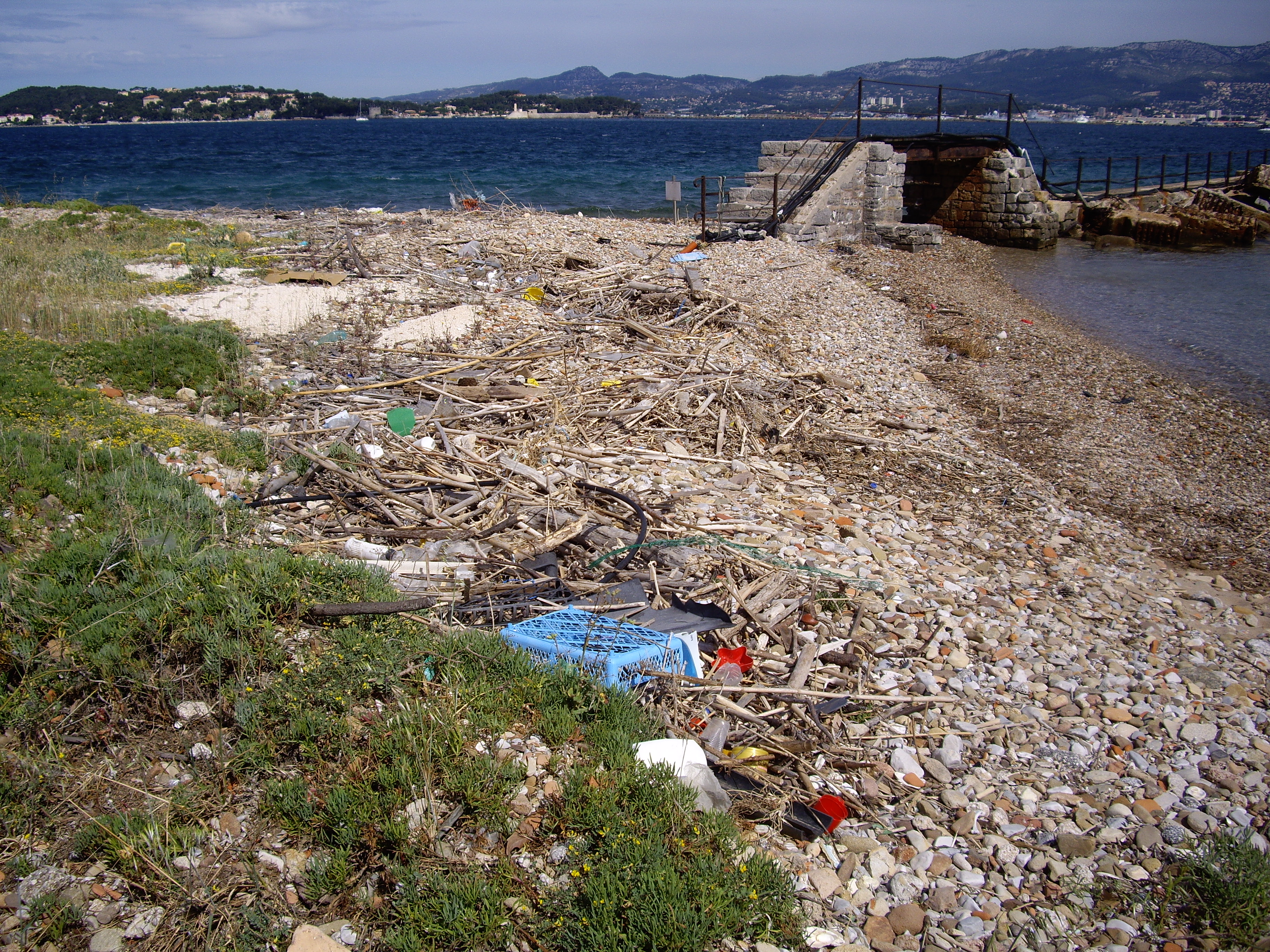 Trashtag 2007 Saint Mandrier France Stephane Belgrand Rousson